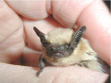 Western Pipistrelle (Pipistrellus hesperus)